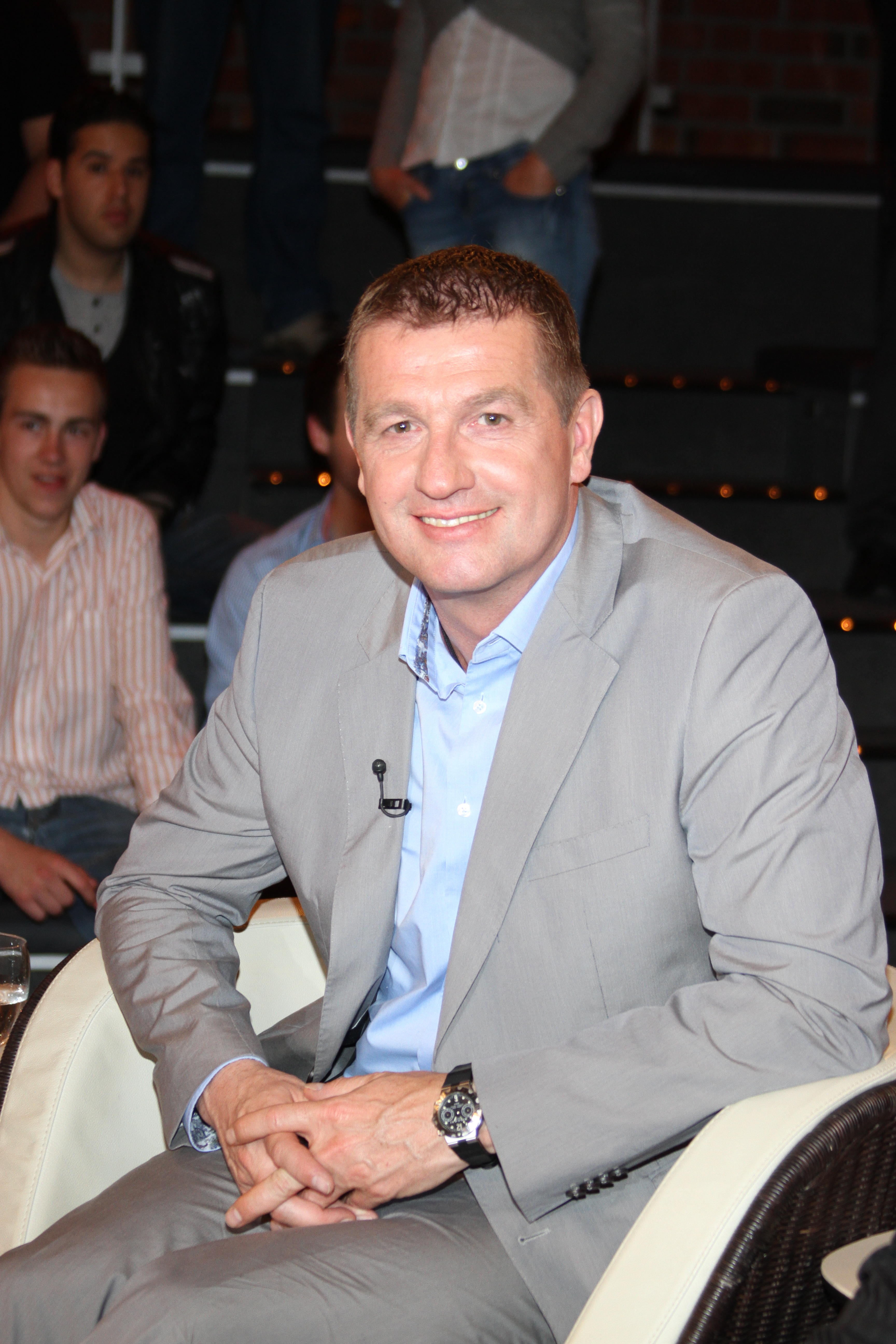 Thomas Strunz (* 25. April 1968 in Duisburg) ist ein ehemaliger deutscher Fußballspieler.